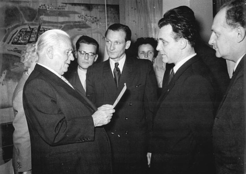 Zentralbild Heilig 18.10.1954 Präsident Wilhelm Pieck besuchte das Kinderkaufhaus am Strausberger Platz, Berlin Überraschend besuchte in den Vormittagsstunden des 18.10.1954 Präsident Wilhelm Pieck in Begleitung des Ministers für Handel und Versorgung Kurt Wach das neueröffnete Kinderkaufhaus am Strausberger Platz in Berlin. Er überzeugte sich von der Güte der Waren und der Vielseitigkeit des Sortiments. UBz: Interessiert studiert Präsident Wilhelm Pieck die Speisekarte des Kinder-Cafés im Beisein von Professor Henselmann (2.von rechts) und Minister Wach (Mitte).